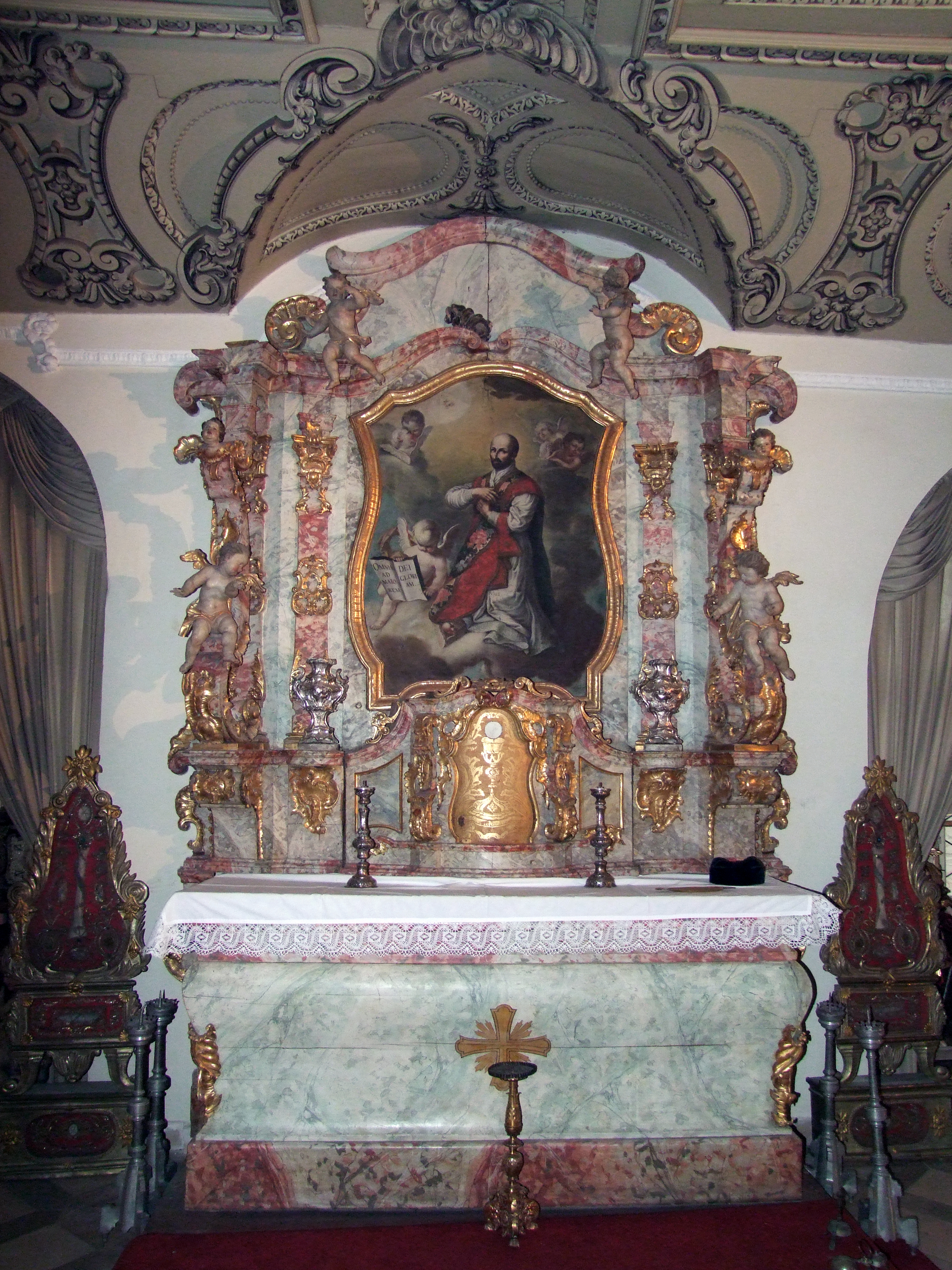 Mariä Verkündigung im oberschwäbischen Mindelheim. Ehemalige Augustiner, dann Jesuitenklosterkirche.